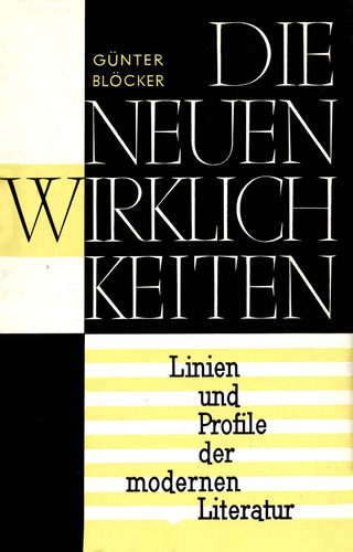 Buchumschlag von Günter Blöcker: "Die neuen Wirklichkeiten" (Argon, 1957).